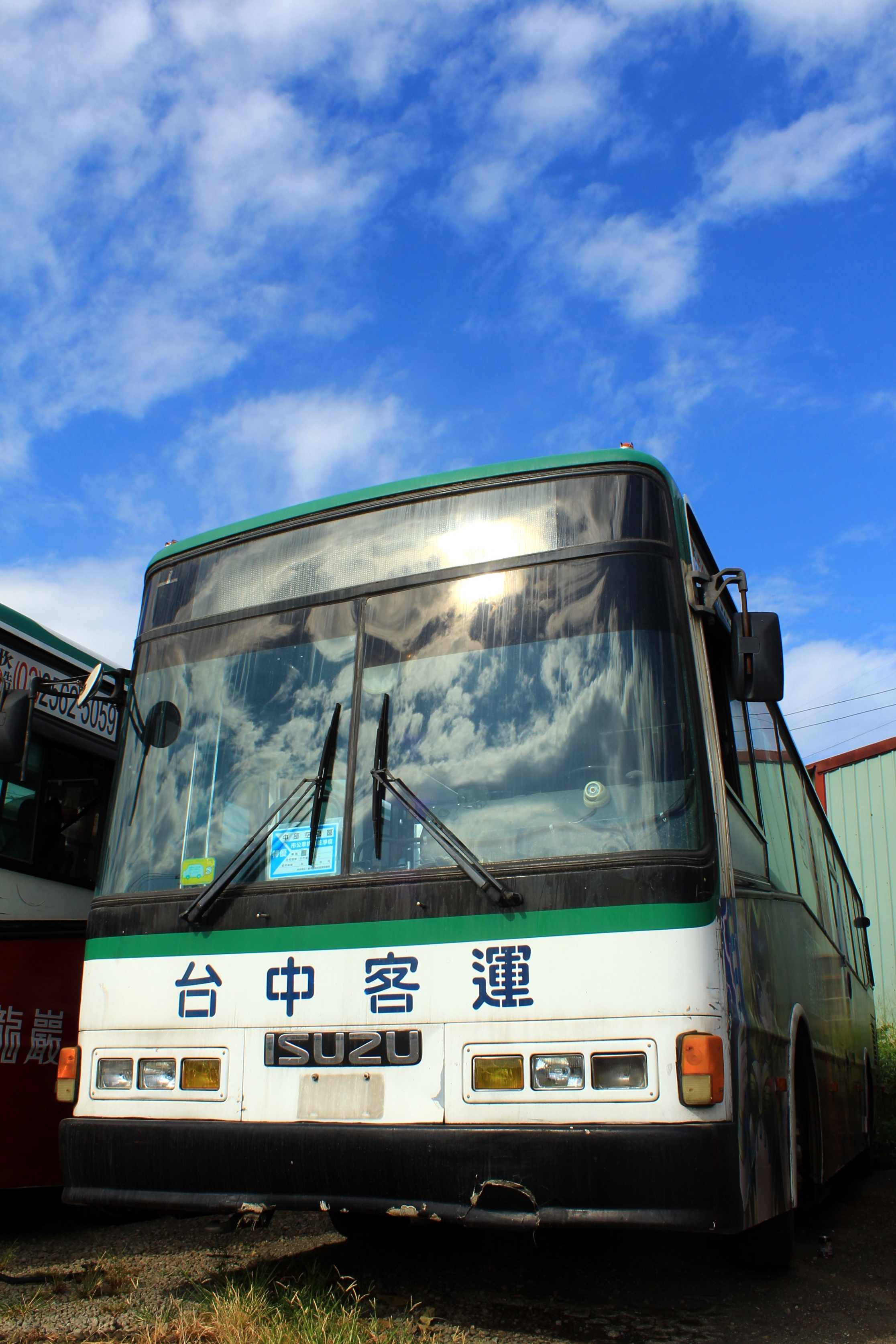 中文（台灣）: 臺中客運報廢的2004年五十鈴LT134P大客車最後身影，停在臺中客運烏日停車場。